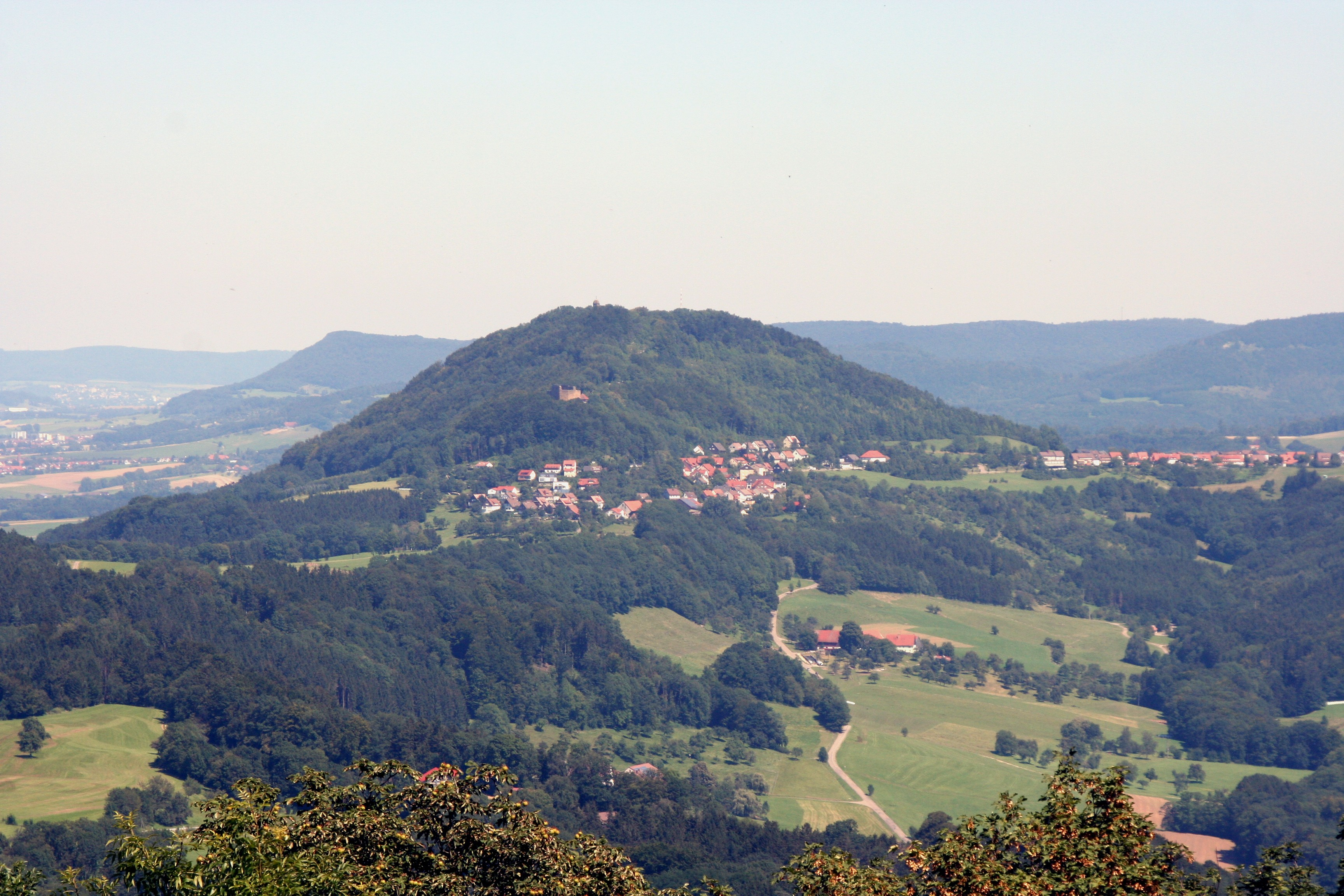 Der Rechberg vom Hohenstaufen aus gesehen